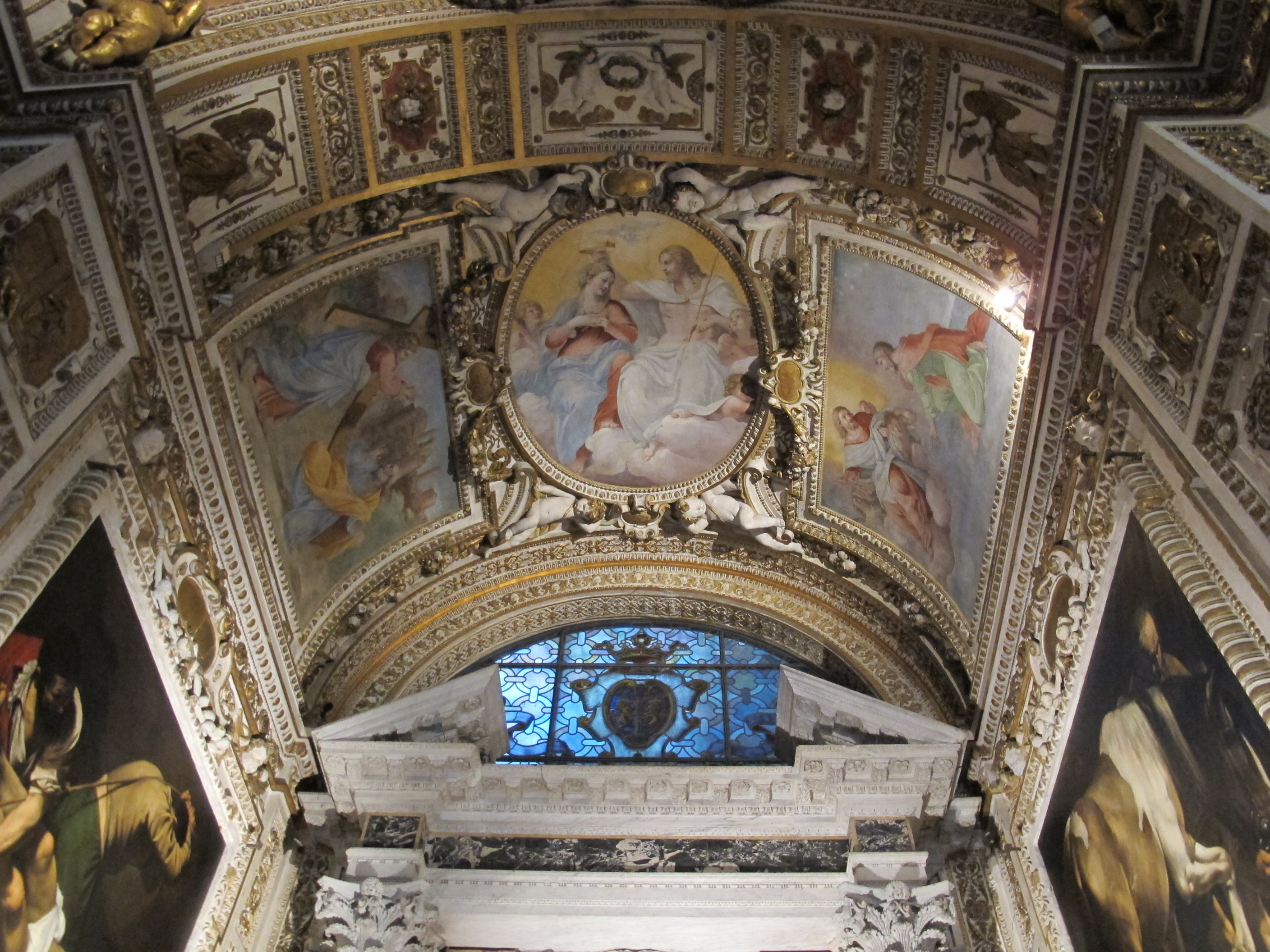 Cappella cerasi 02 affreschi di innocenzo tacconi (inizi XVII sec)